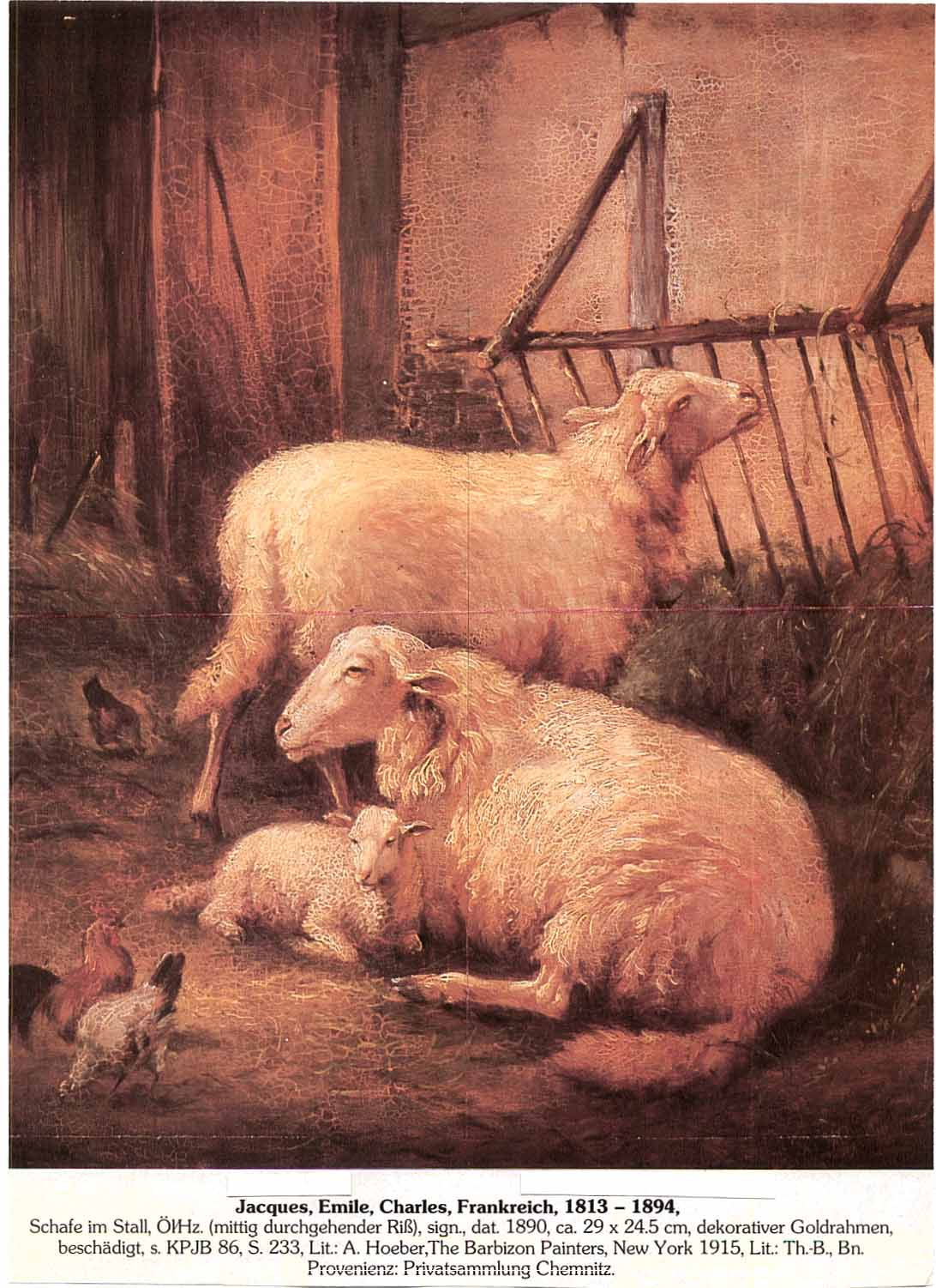 Charles Emile Jacque, selbst fotografiert 1990, Lizenz selbst, keine weitere Wikipedia Variante